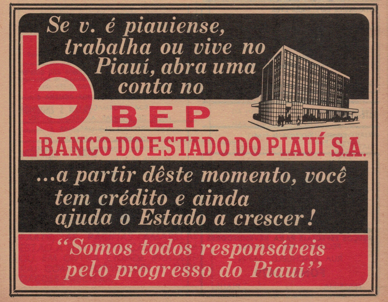 Papel de mídia do Banco do Estado do Piauí S A em 1972.